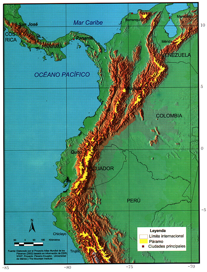 Mapa de los páramos en América